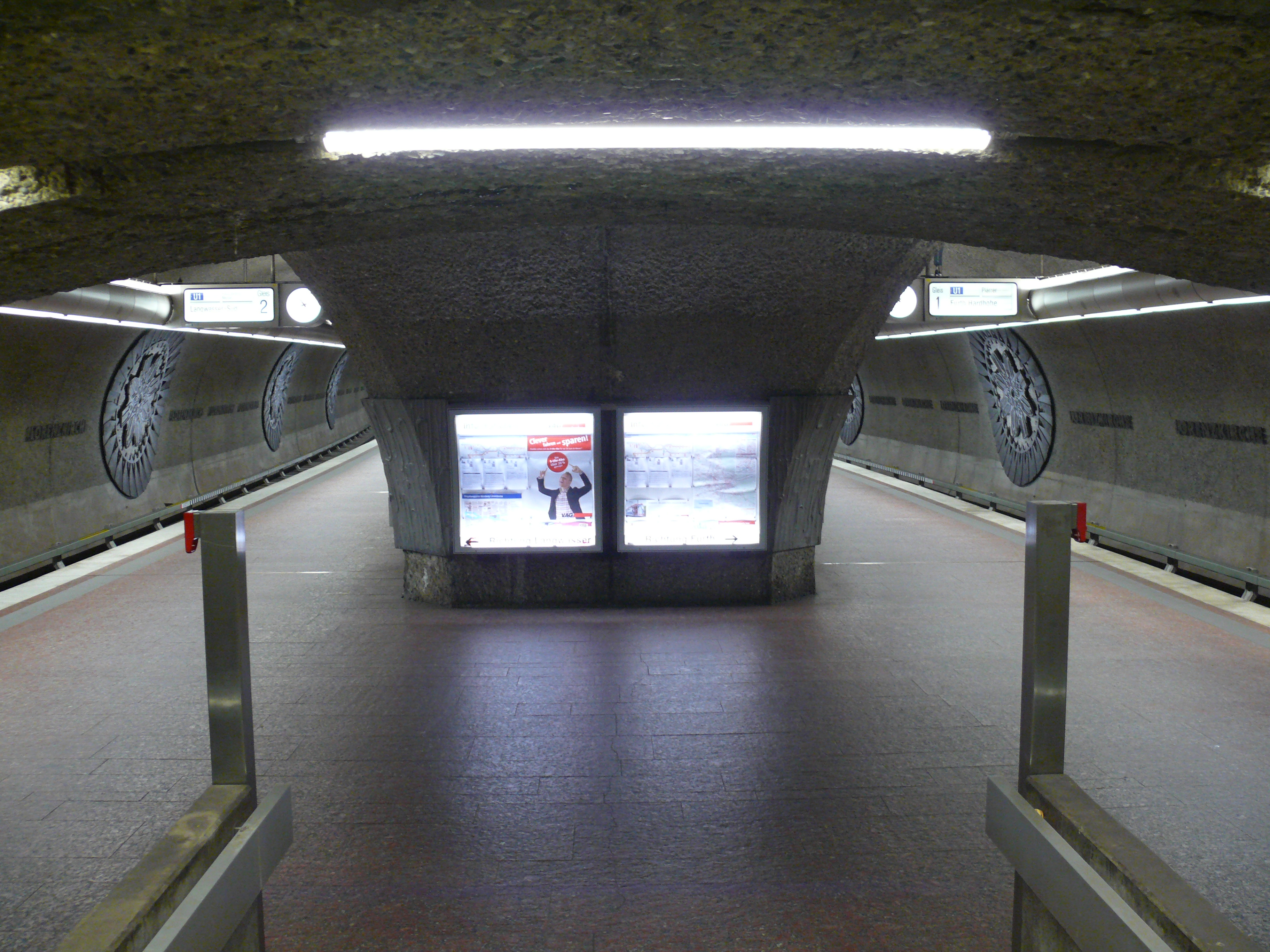 Blick auf die Bahnsteigebene, bzw. die 2 Bahnsteigröhren am U-Bahnhof Lorenzkirche in Nürnberg.